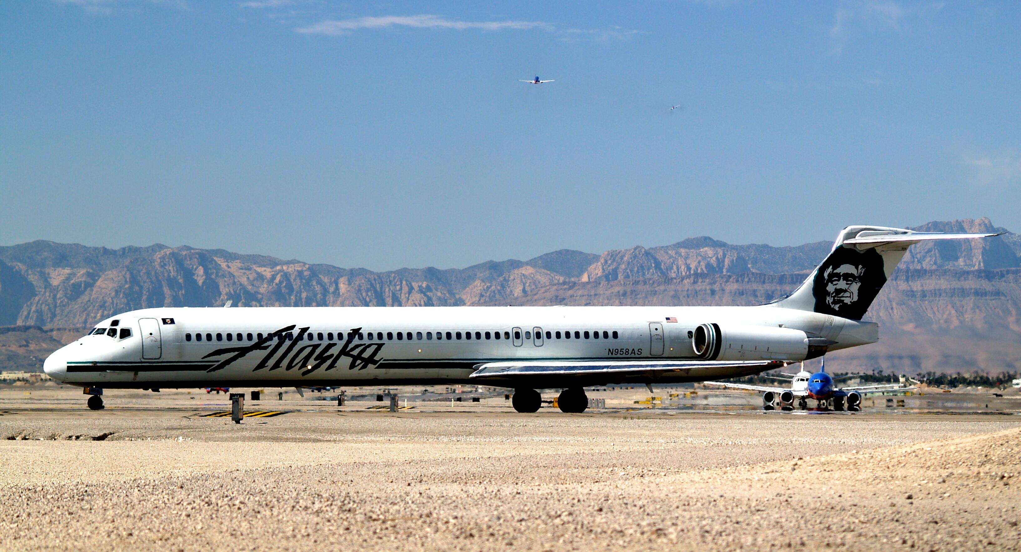 Alaska Airlines McDonnell Douglas MD-83 N958AS